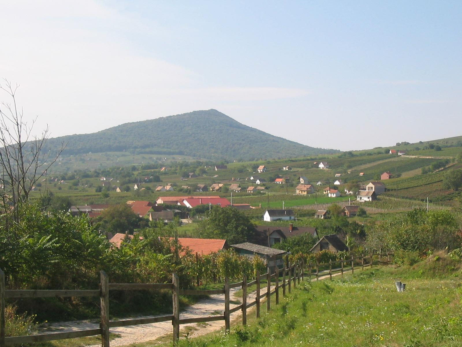 Grape plantations near Villány, in Southern Hungary. In the background, you can observe the mountain named "Szársomlyó". Szőlültetvények Villány közelében, Dél-Magyarországon. A háttérben a "Szársomlyó" nevű hegyet figyelheted meg.